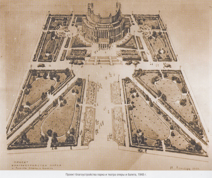 проект благоустройства театрального сквера